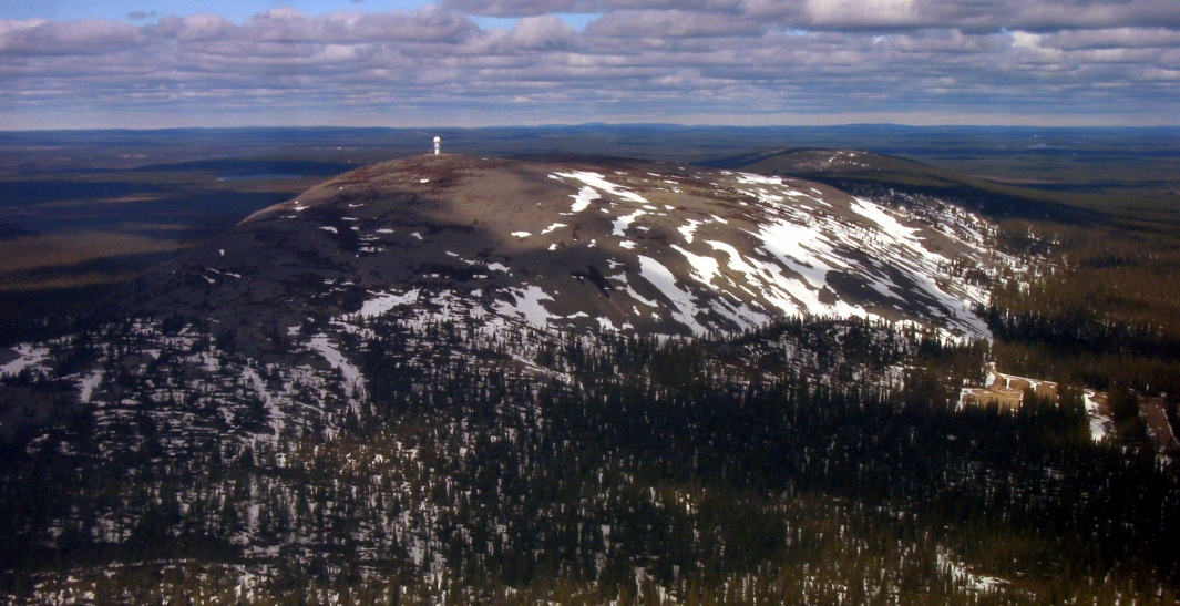 Luosto ilmasta toukokuun lopulla. Laella näkyy säätutka.